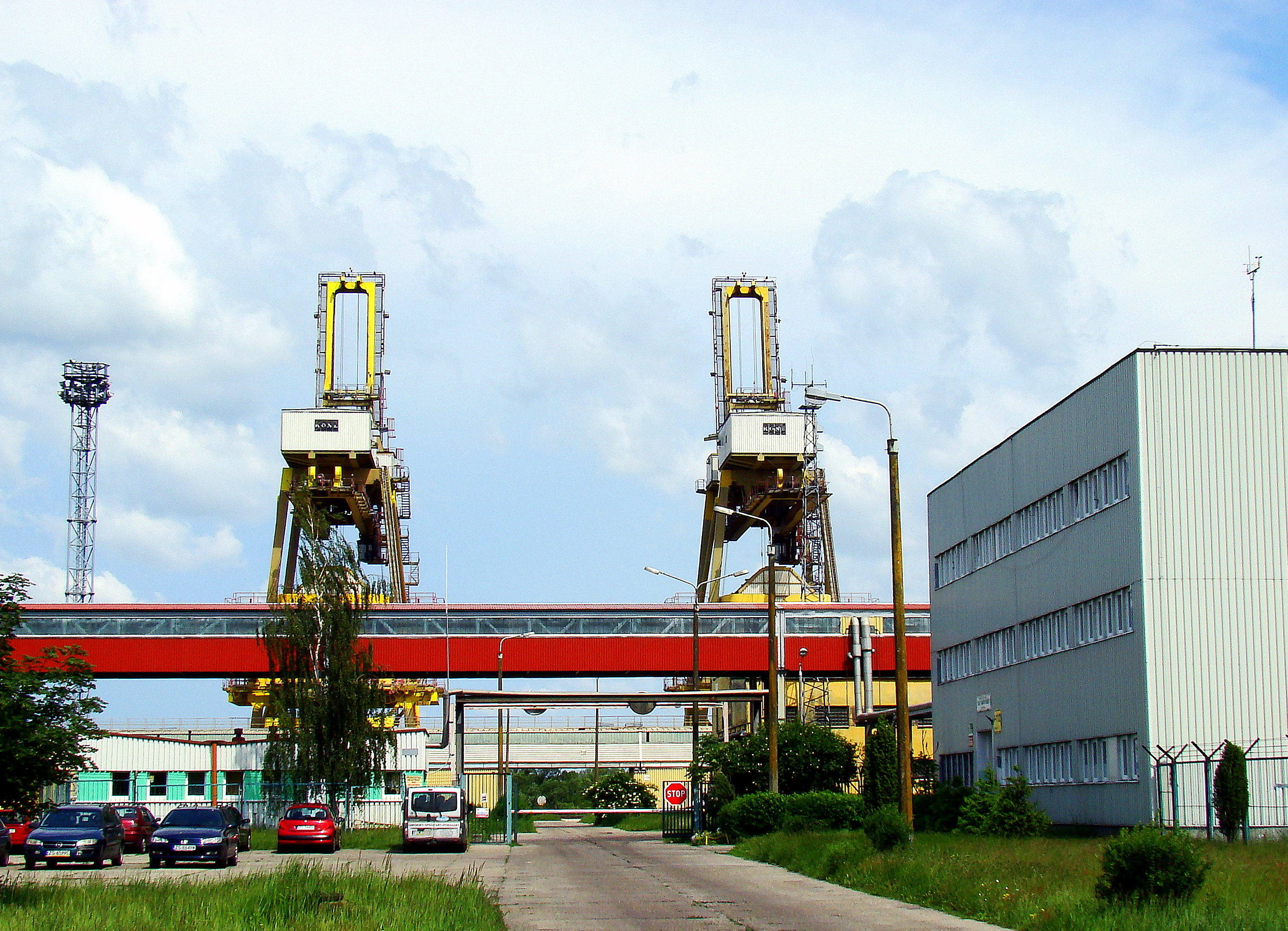 Port Police, (Port Morski, brama główna), Województwo zachodniopomorskie, Polska